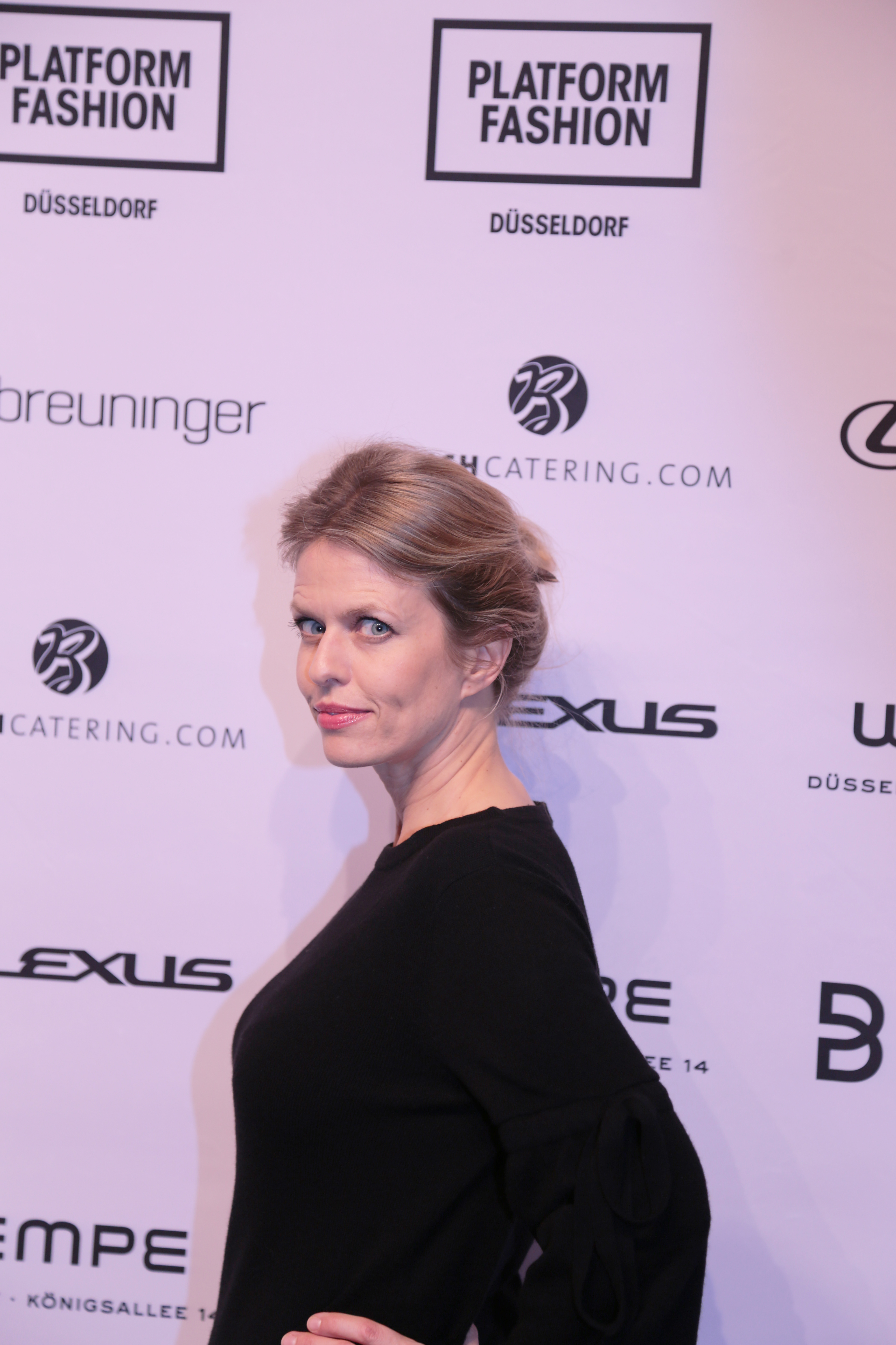 Miriam Lahnstein bei der Breuninger Fashionshow im Rahmen von Platform Fashion, am 26. Januar 2018.